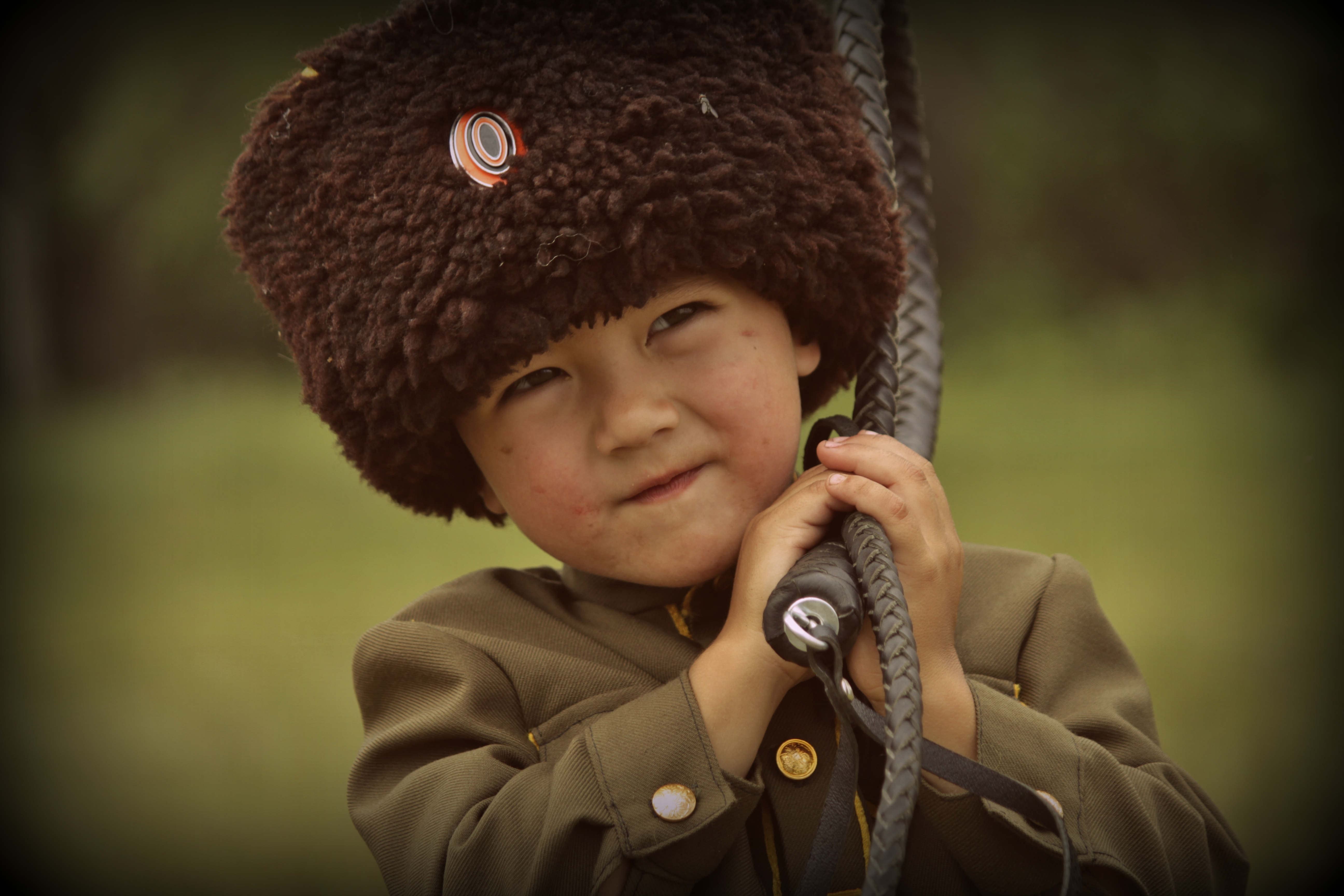 Ваня Кудрявцев - четырехлетний казачок из Баяна Джидинского района Бурятии